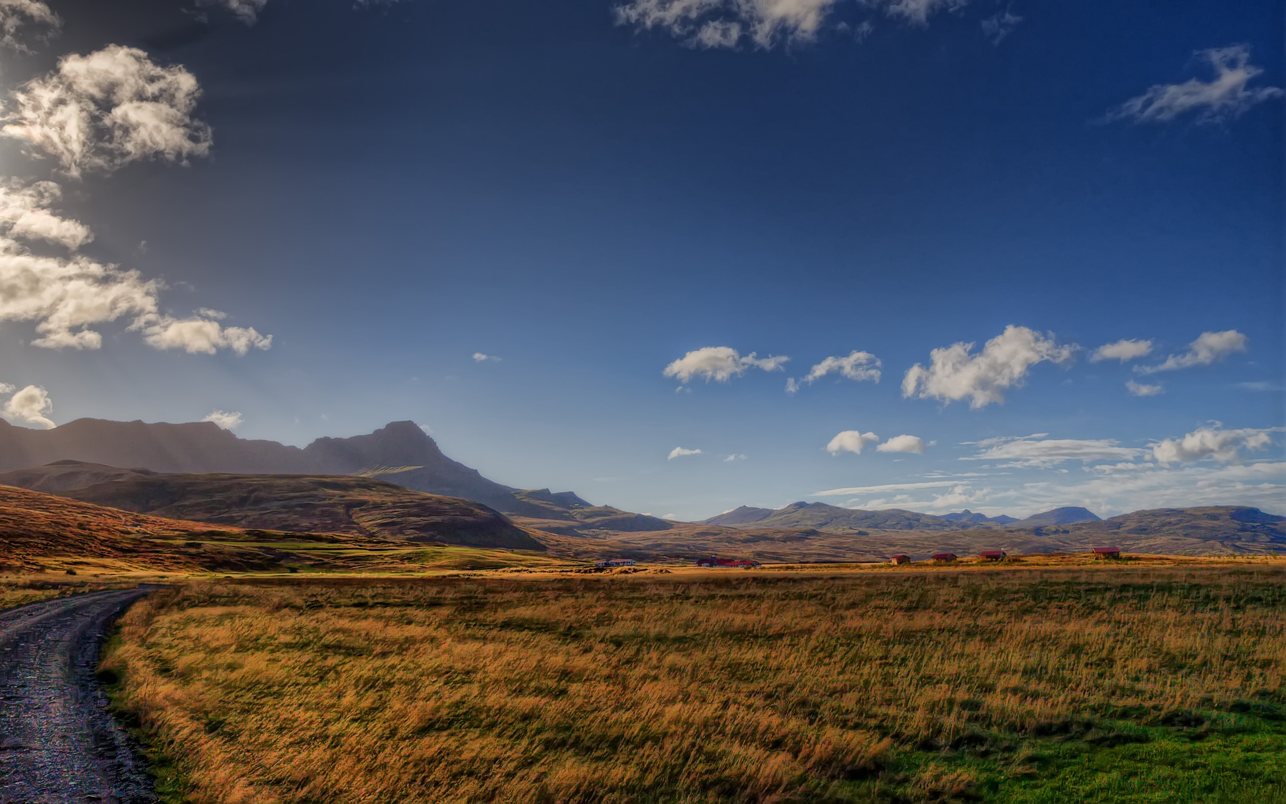 Skorradalur, Iceland